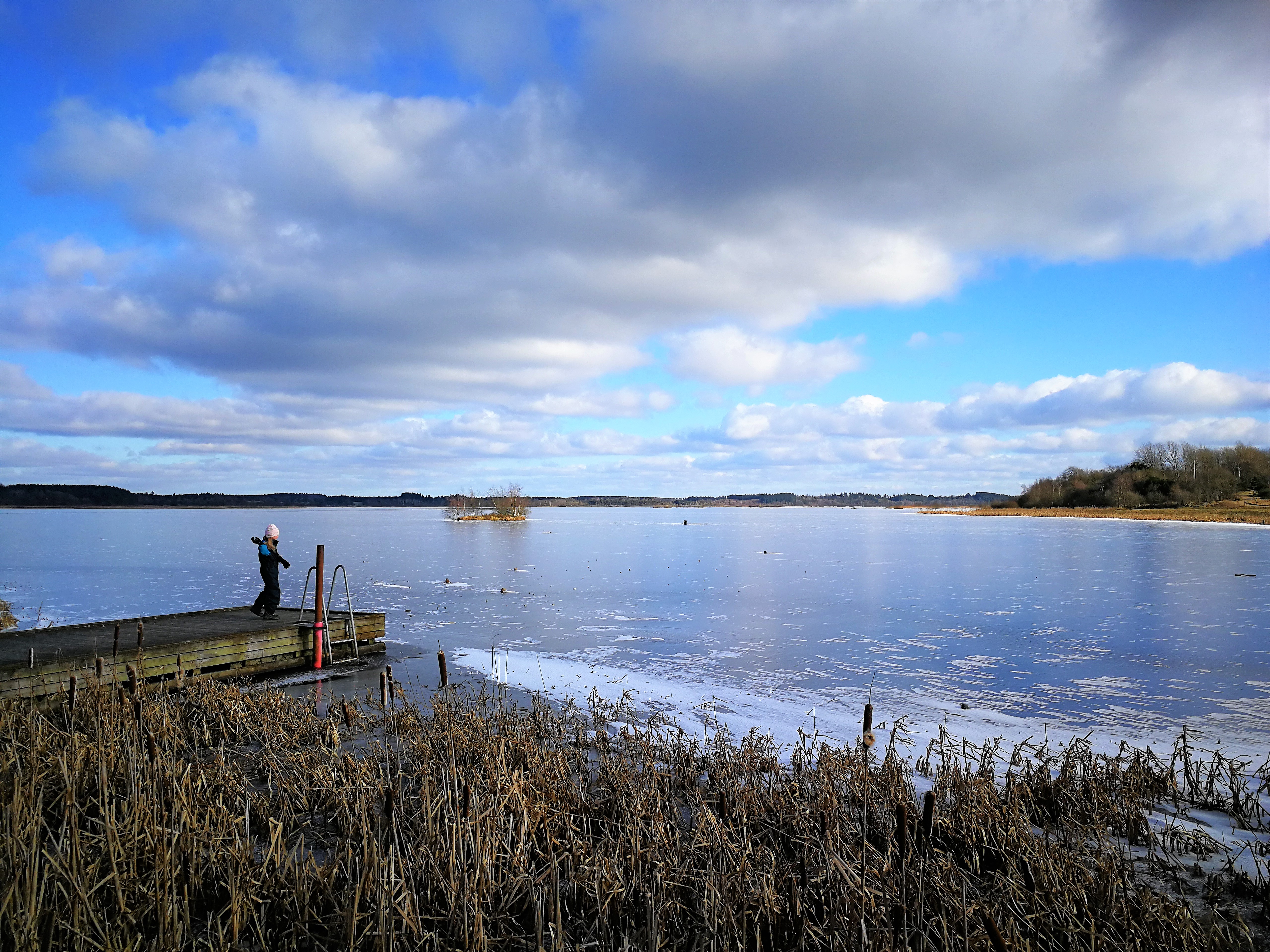 Bøllingsø i februar, med is på; set mod øst